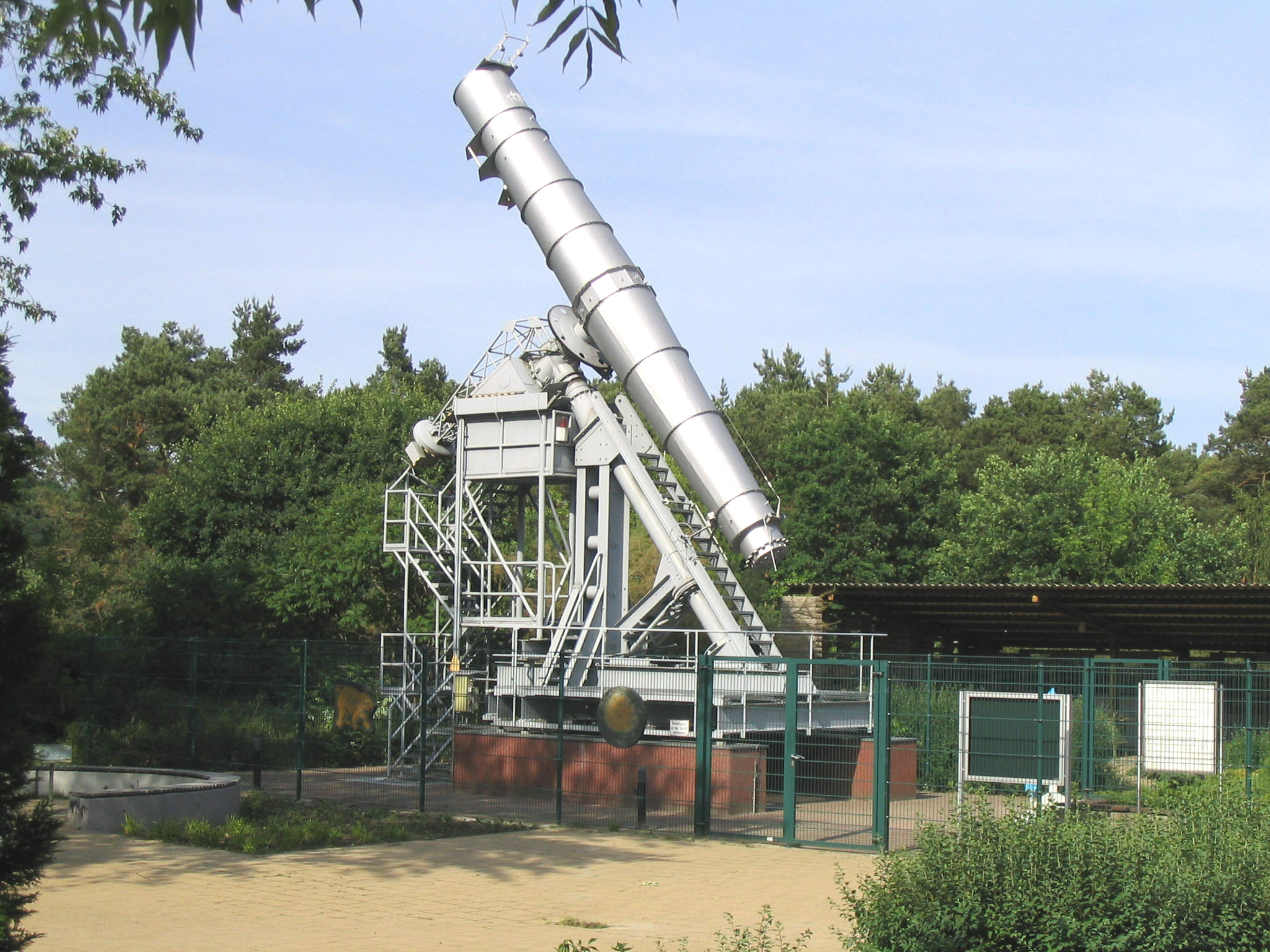 Das Rathenower Brachymedial-Fernrohr befindet sich seit Dez. 2008 auf dem Gelände des Optikparks Rathenow. Autor: Rainer Ortmann Quelle: Bild selbst erstellt Aufnahmedatum: 06.06.2003